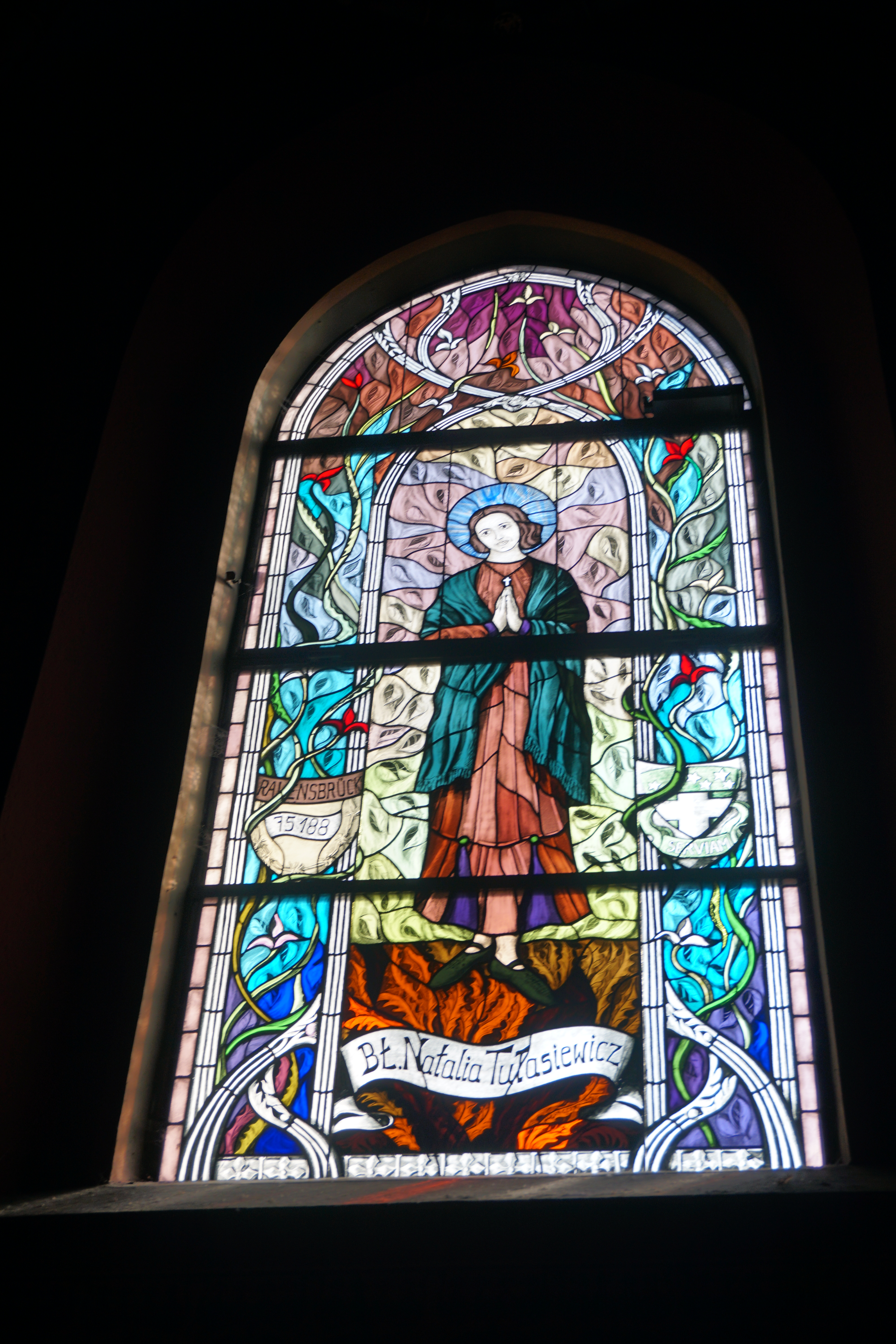 witraż z wizerunkiem bł. Natalii Tułasiewicz w poznańskim kościele św. Wojciecha